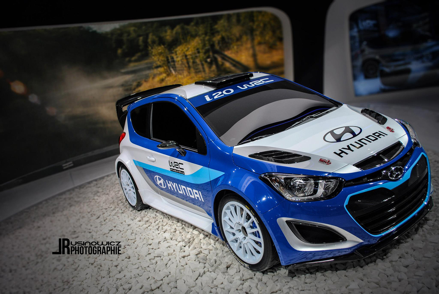 Hyundai i20 WRC, Paris 2012 par Lucas Rusinowicz